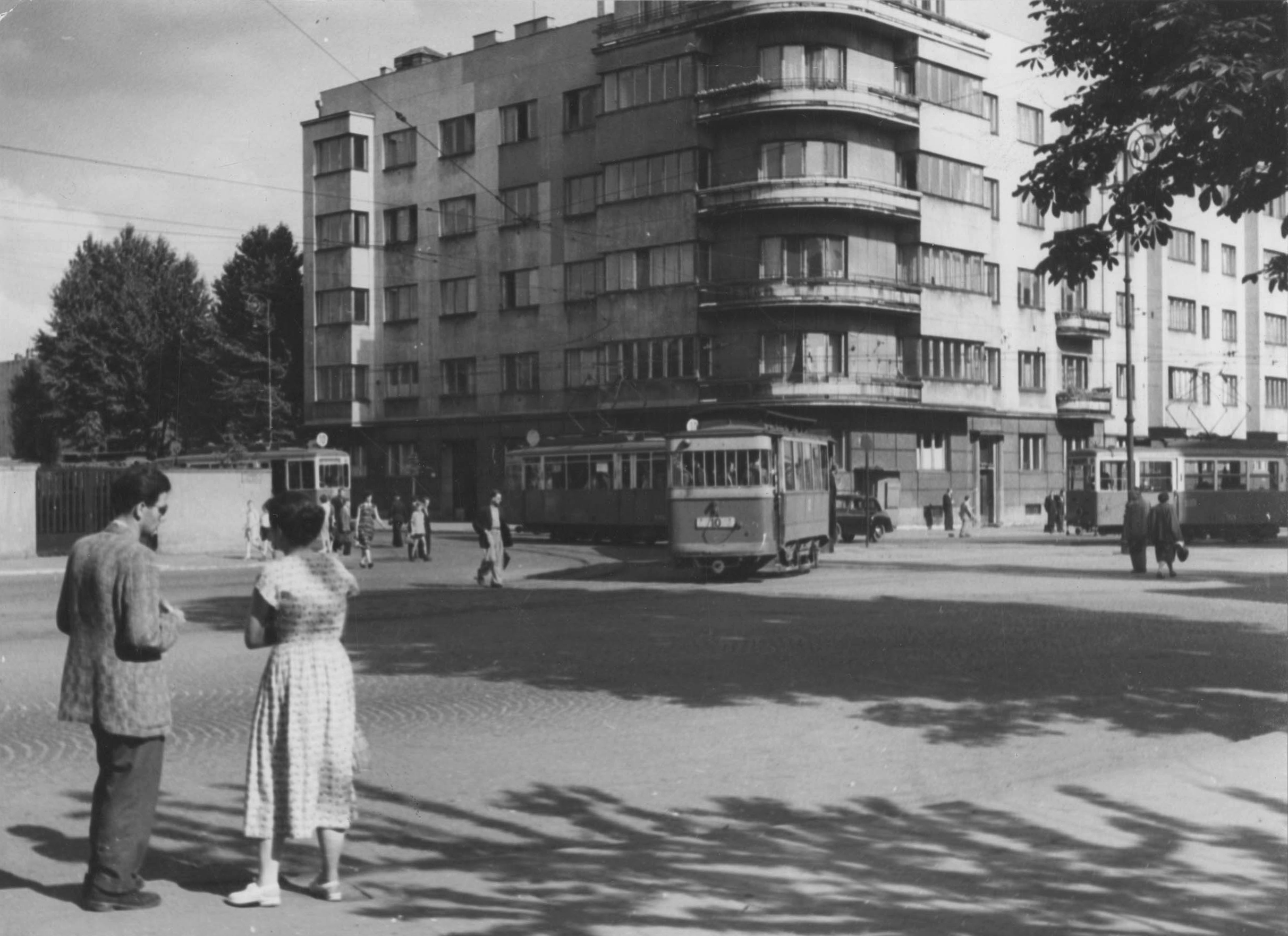 Fotografia Ignacego Płażewskiego przedstawiająca modernistyczne kamienice w tak zwanym „stylu ’37”przy zbiegu alei Kościuszki i Mickiewicza. Widoczne na zdjęciu obie kamienice były własnością Karola i Teodora Enderów, którzy postanowili zagospodarować teren znajdujący się u zbiegu ulic Spacerowej (ob. al. Kościuszki) i Anny (ob. al. Mickiewicza). Narożną kamienicą z 1937 r. zwaną „Domem literatów” zaprojektował Paweł Lewy, zaś drugą ukończono w 1939 r. wg projektu Radosława Hansa. Na fotografii widać codzienny ruch komunikacji miejskiej oraz mieszkańców w centrum miasta.